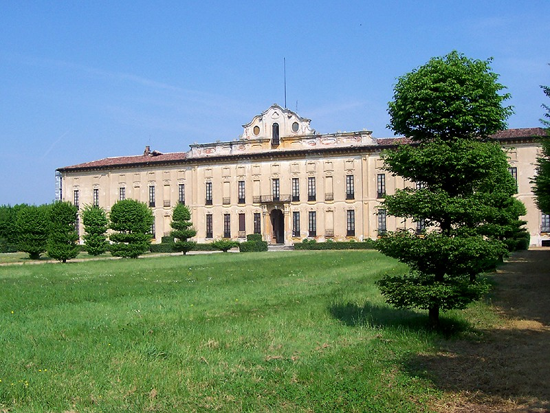 Castellazzo di Bollate - Villa Arconati